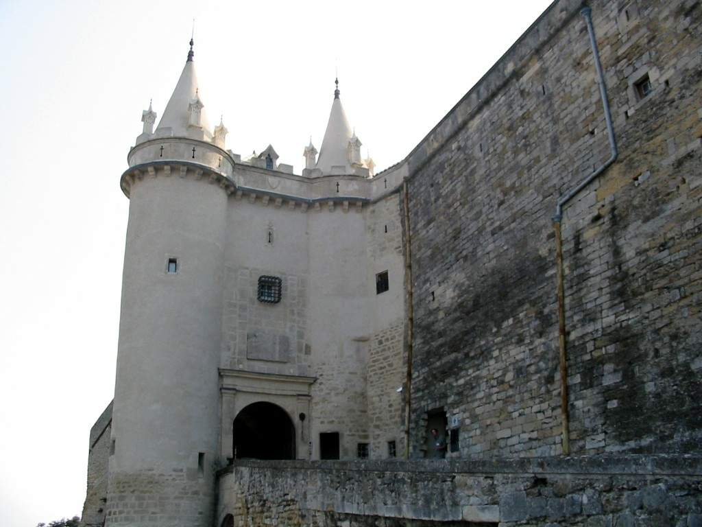 Château de Grignan (Drôme) ATTENTION , erreur de nommage de la photo : Chateau Grignan et non pas de Suze la Rousse